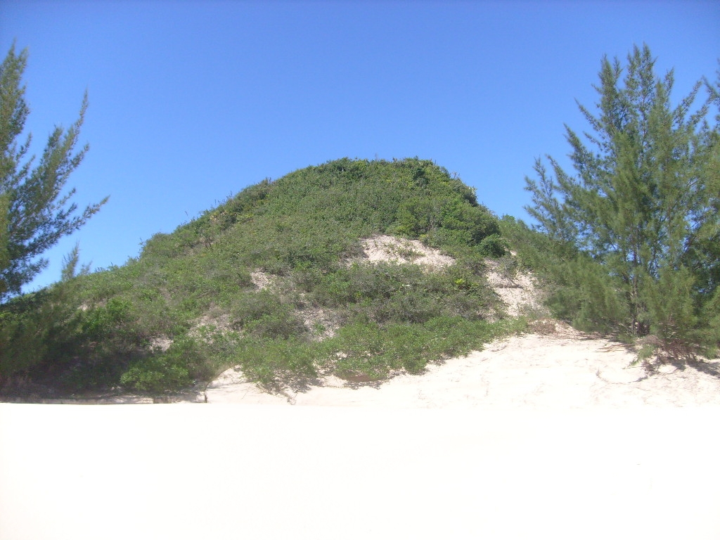 Foto em close do sambaqui Figueirinha II